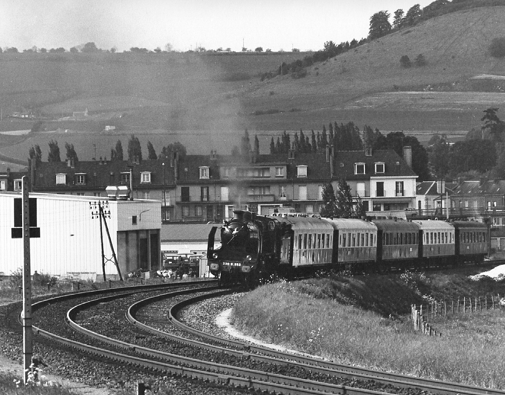 Trains spécial de l'agence suisse Intraflug passant à Neufchatel-en-Bray en 1978.